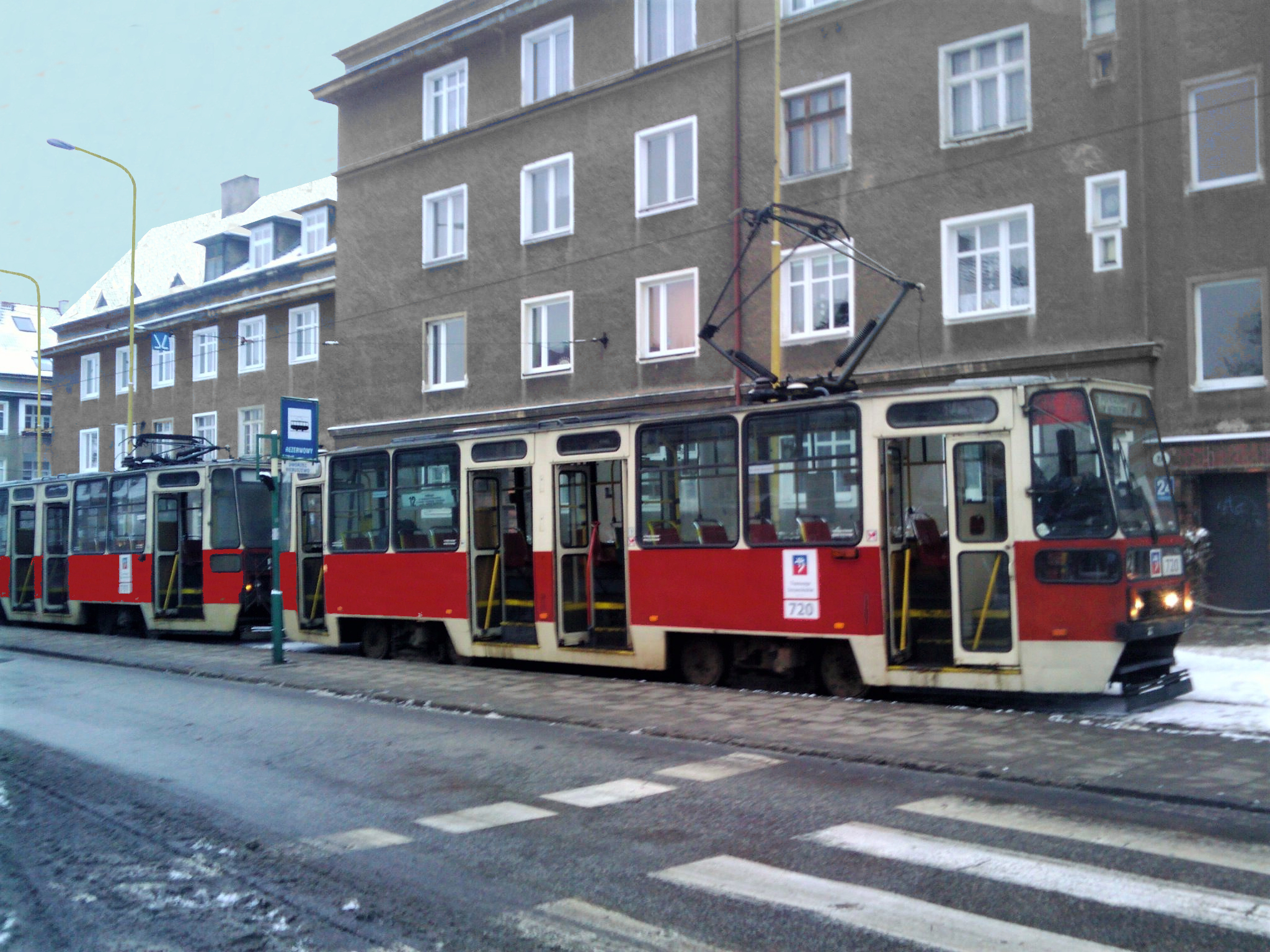 Tramwaj 105N w Szczecinie